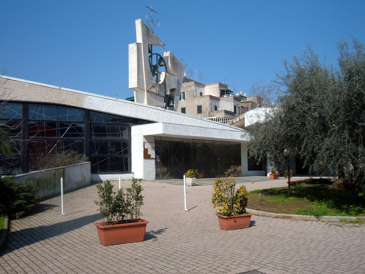 Chiesa di San Bernardo di Chiaravalle, a Roma, nel quartiere Prenestino-Centocelle.